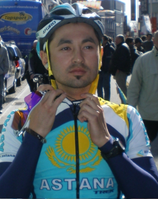 Assan Bazayev - 3daagse van West Vlaanderen